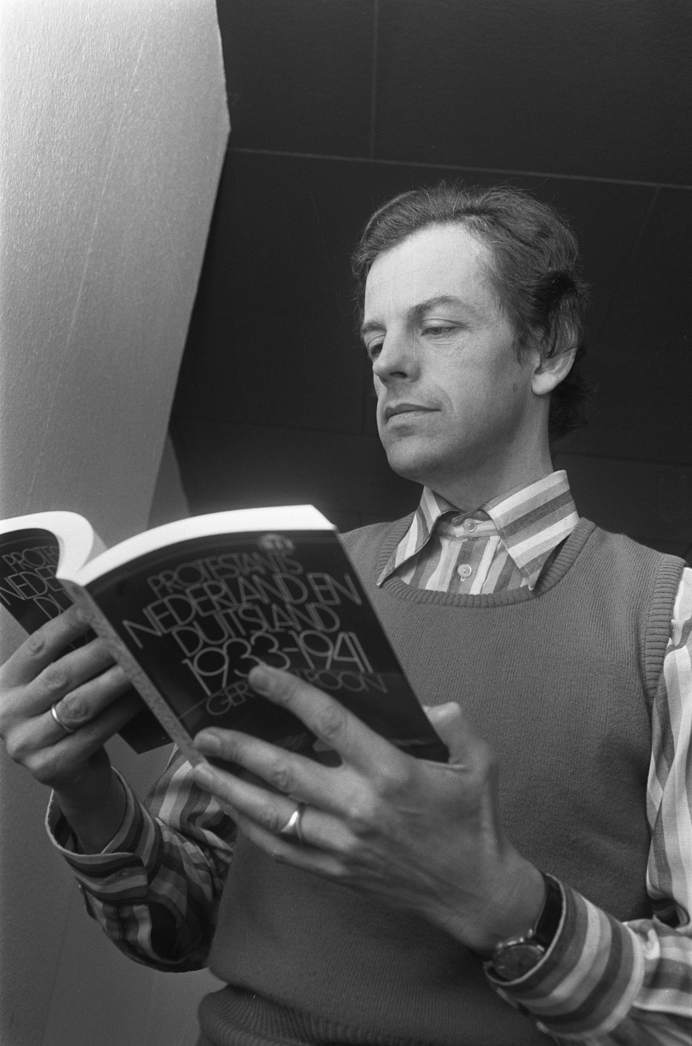 Collectie / Archief : Fotocollectie Anefo Reportage / Serie : Boekpresenatie door Dr. G. van Roon van zijn boek "Protestants Nederland en Duitsland 1933-1941" Beschrijving : De auteur met zijn boek Datum : 27 februari 1974 Trefwoorden : auteurs, boeken Persoonsnaam : Roon, G. van Fotograaf : Fotograaf Onbekend / Anefo Auteursrechthebbende : Nationaal Archief Materiaalsoort : Negatief (zwart/wit) Nummer archiefinventaris : bekijk toegang 2.24.01.05 Bestanddeelnummer : 927-0328